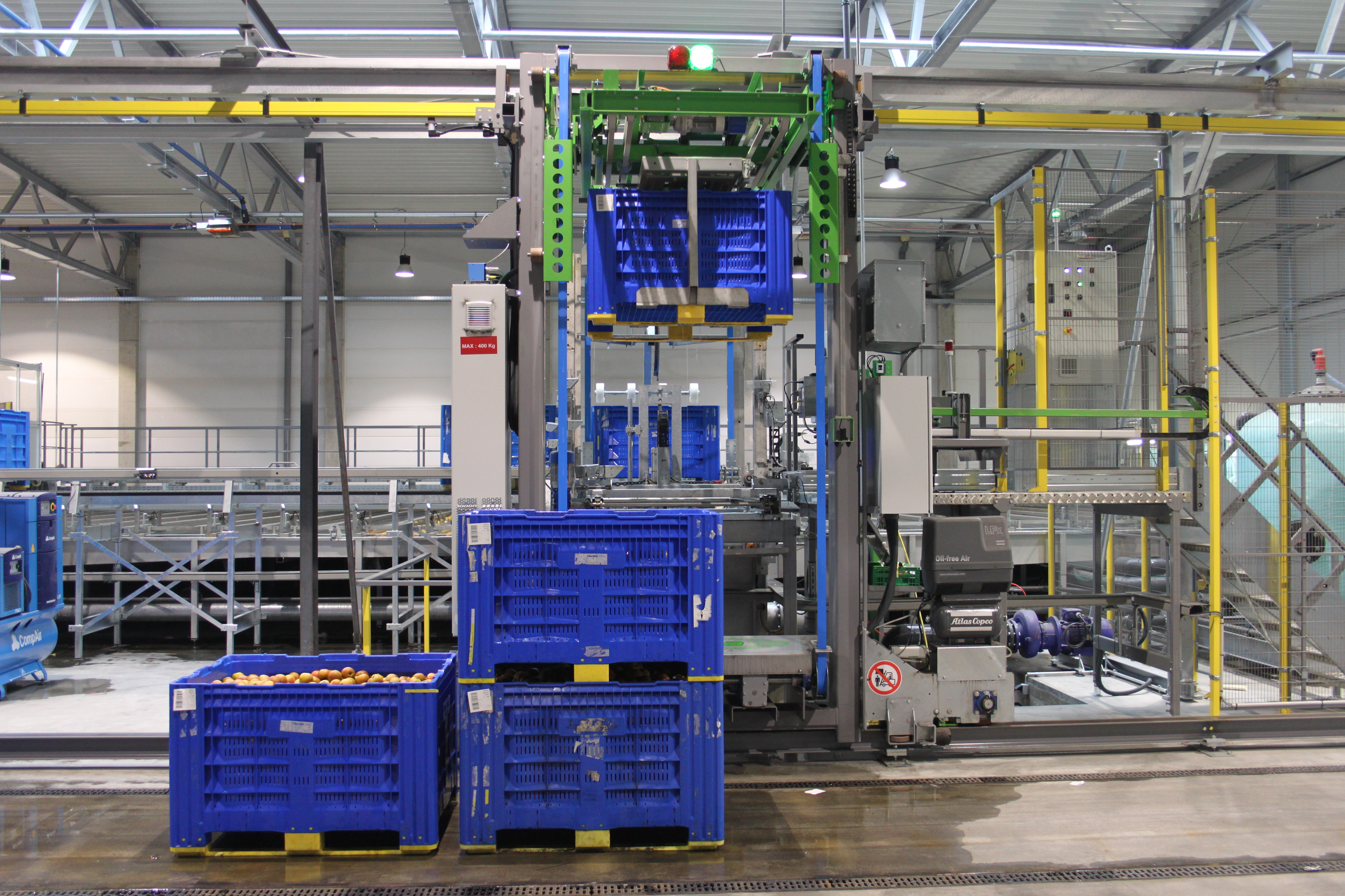 Automatischer Großkistenlader der (Apfel-)Sortiermaschine bei der Elbe-Obst Jork